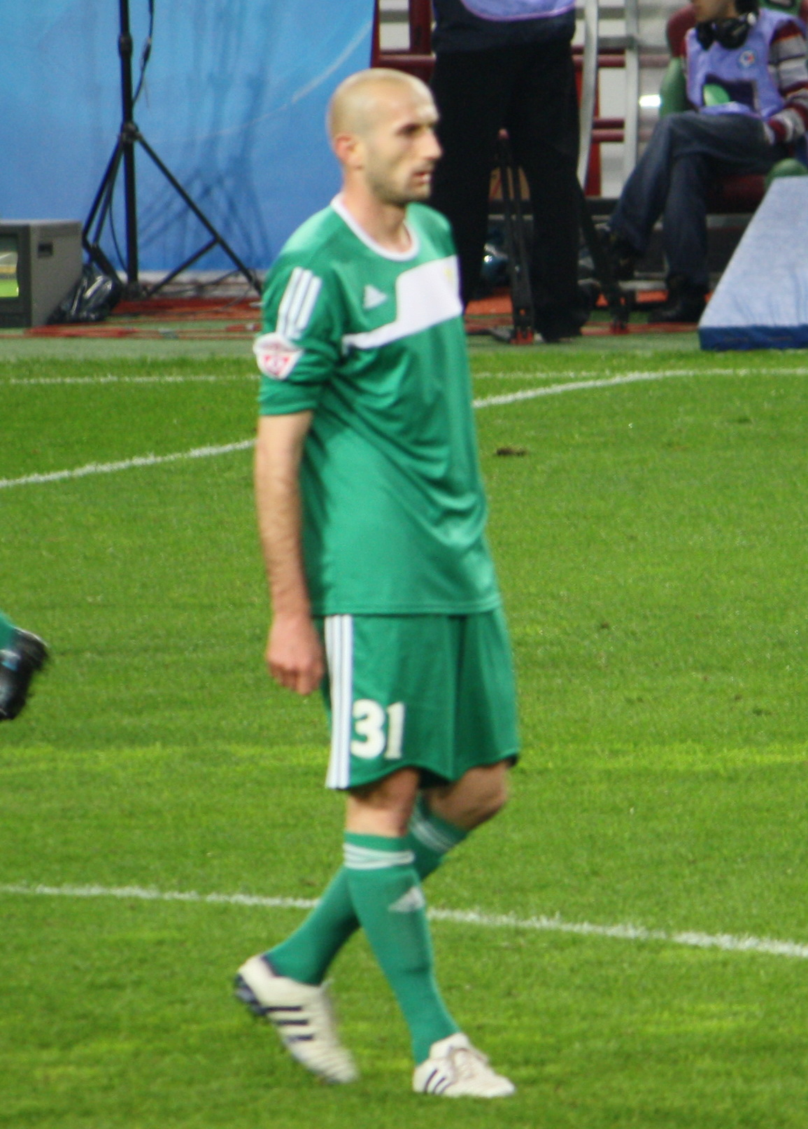 Mitar Peković